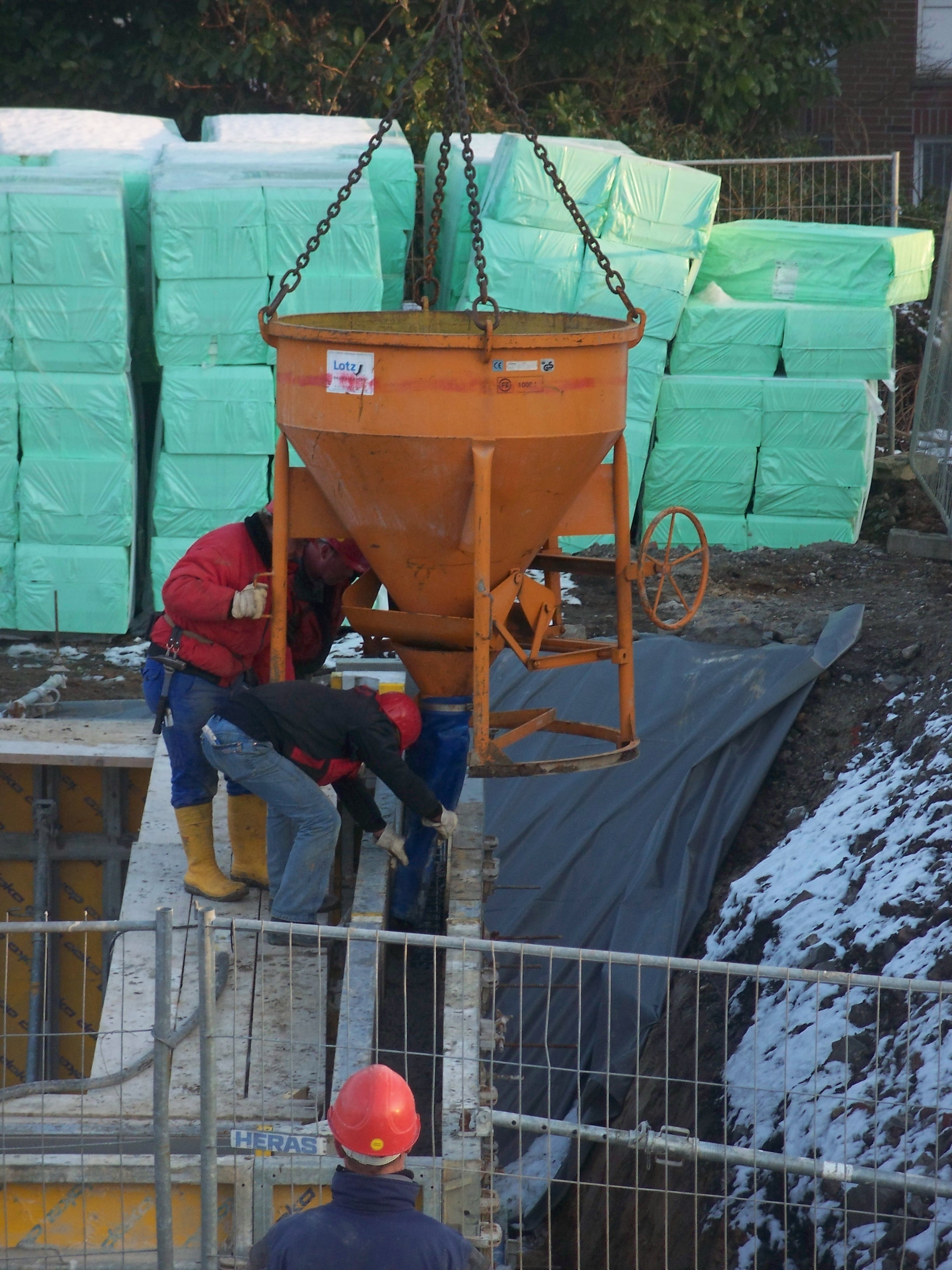 Betonkuebel beim Befüllen einer Schalung mit Beton